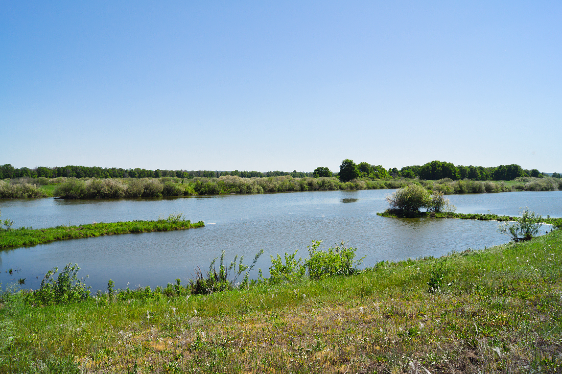 Старическое озеро Веловощ в районе деревни Михайловка, Муромский район Владимирской области